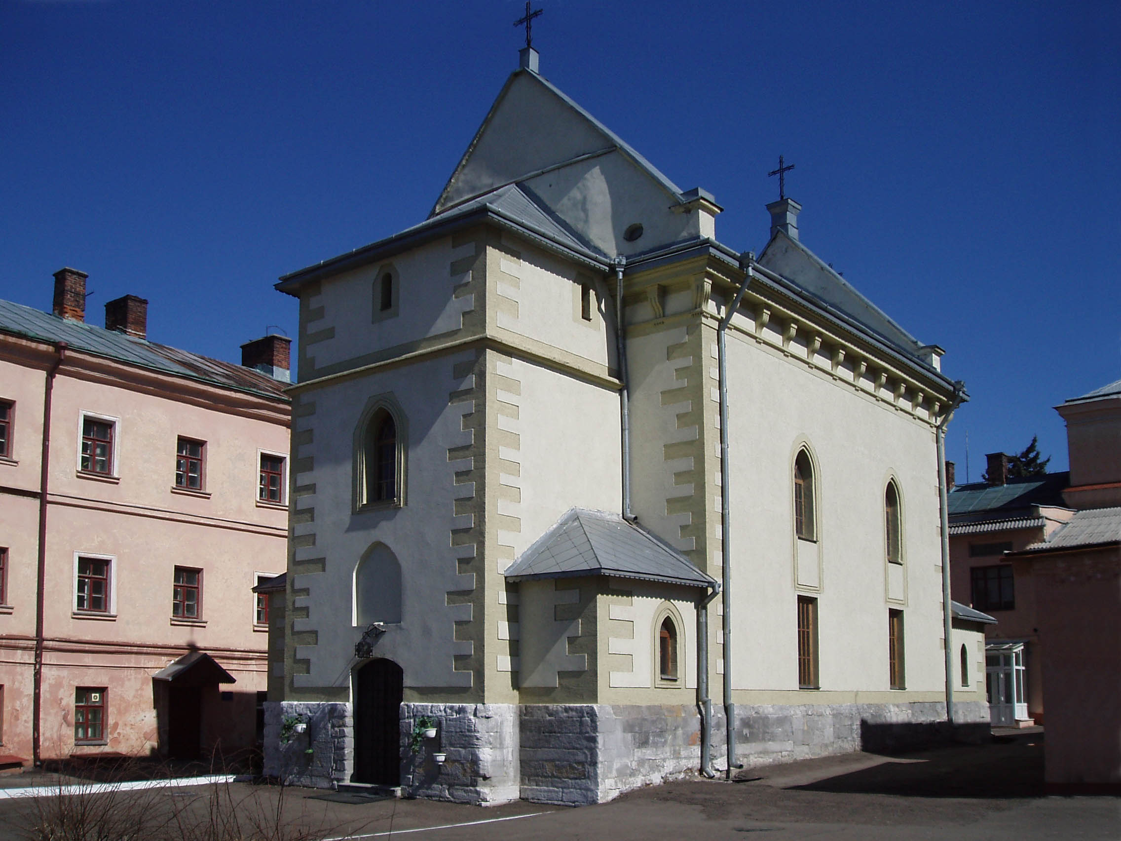 Церква Святого Хреста у Львові на вулиці Замарстинівській, 9